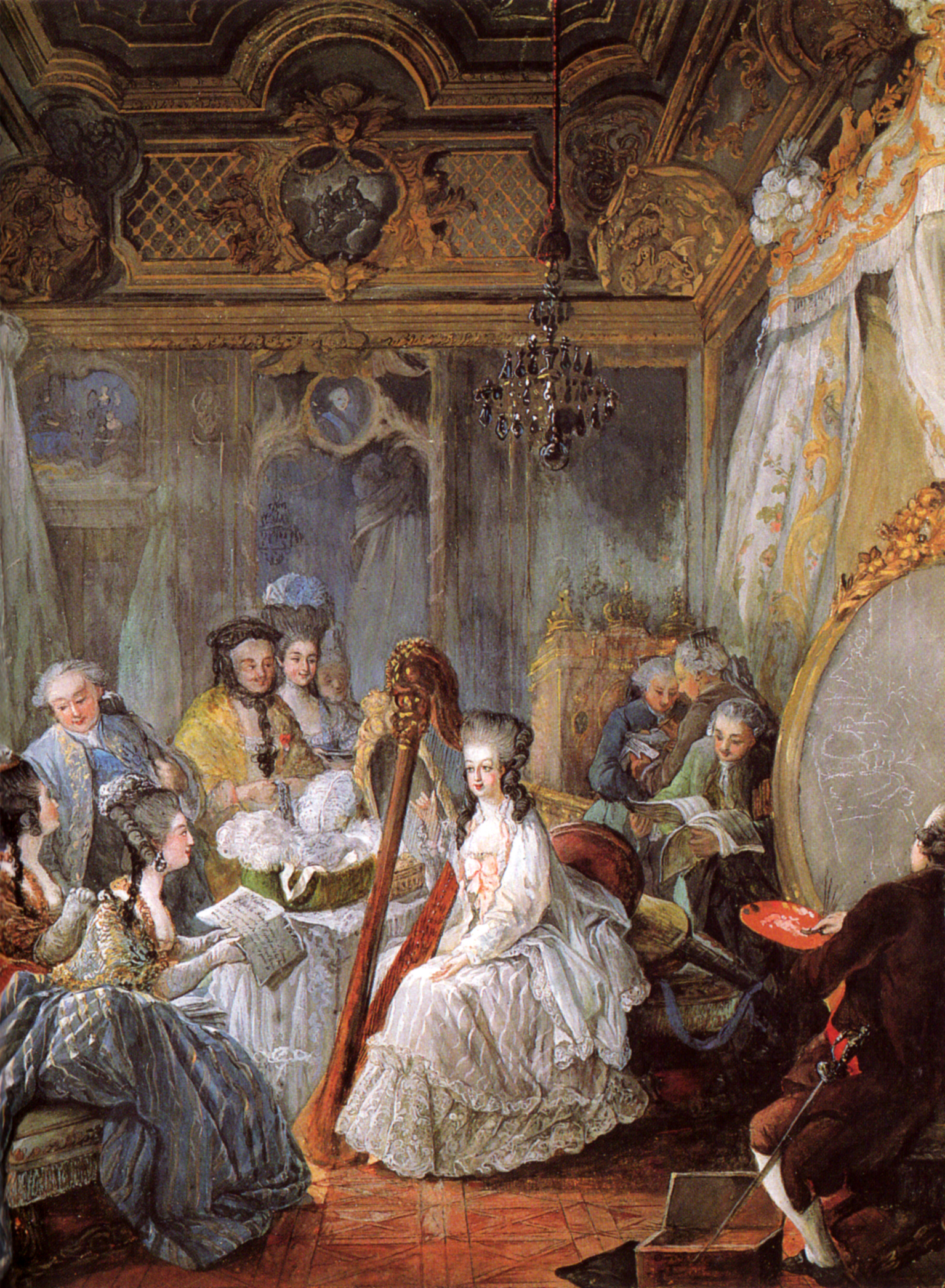 Jean-Baptiste-André Gautier-Dagoty portraiturant la Reine dans sa chambre